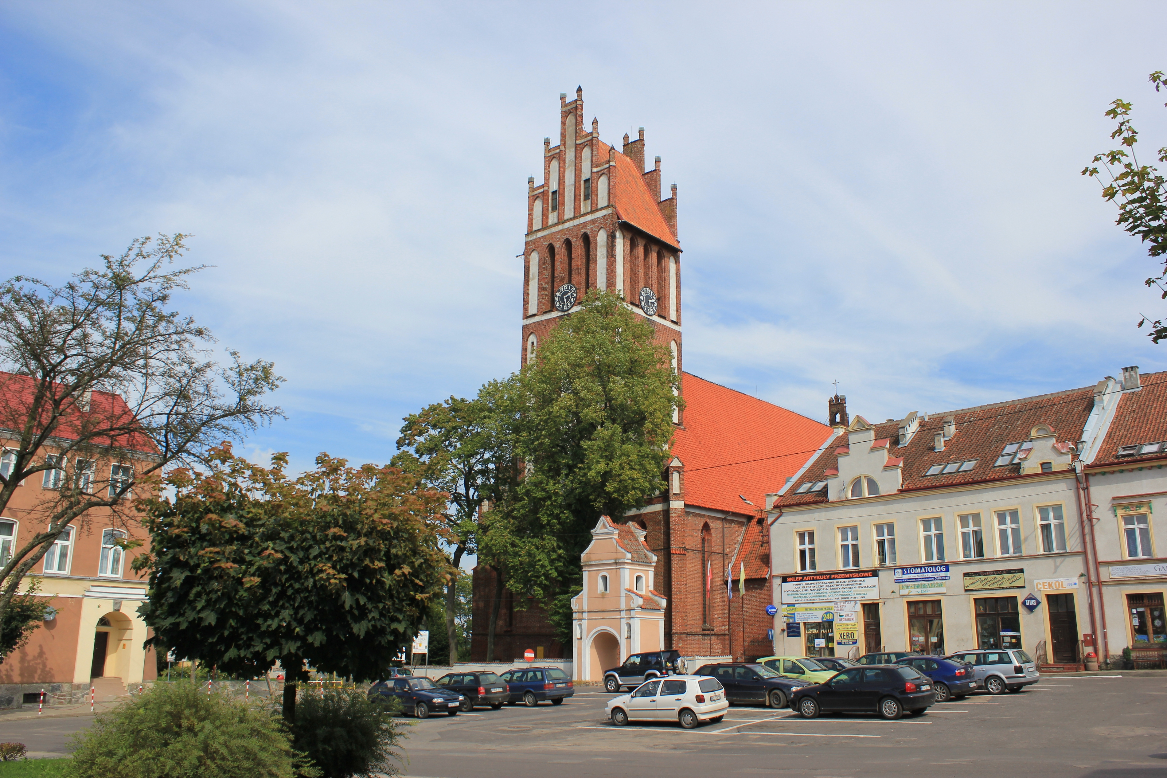 Hornjoserbsce: Cyrkej w Jezioranach, Pólska.